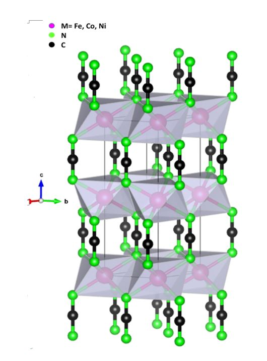 Crystal structure of MNCN with M= Fe, Co, Ni